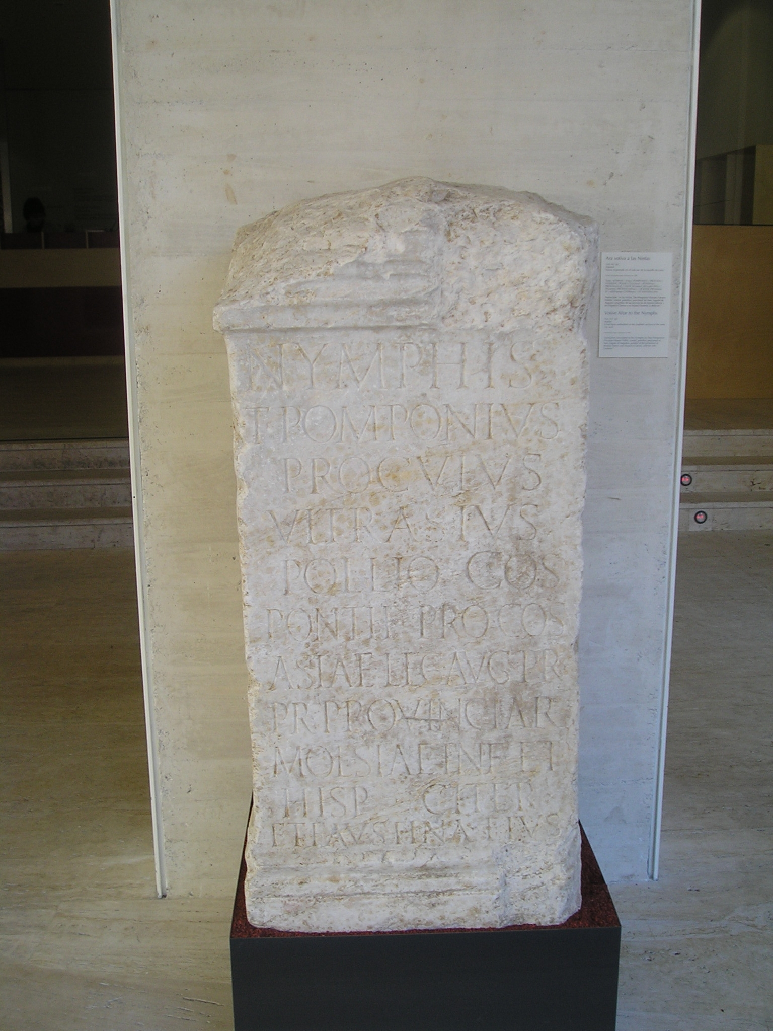 Ara votiva dedicada a las Nimfas en Legio, la actual León (España), depositada en el Museo de León, correspondiente con la inscripción CIL II 5679, cuyo texto dice: NYMPHIS/ T(itus) POMPONIVS/ PROCVLVS/ VITRASIVS/ POLLIO CO(n)S(ul)/ PONTIFEX(ex) PROCO(n)S(ul)/ ASIAE LEG(atus) AVG(usti) PR(o)/ PR(aetore) PROVINCIAR(um)/ MOESIAE INF(erioris) ET/ HISP(aniae) CITER(ioris)/ ET FAVSTINA EIVS